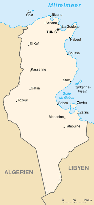 Karte Tunesien